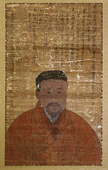 회헌 영정, 경북 영주시 소수서원 소장, 국보 제 111호